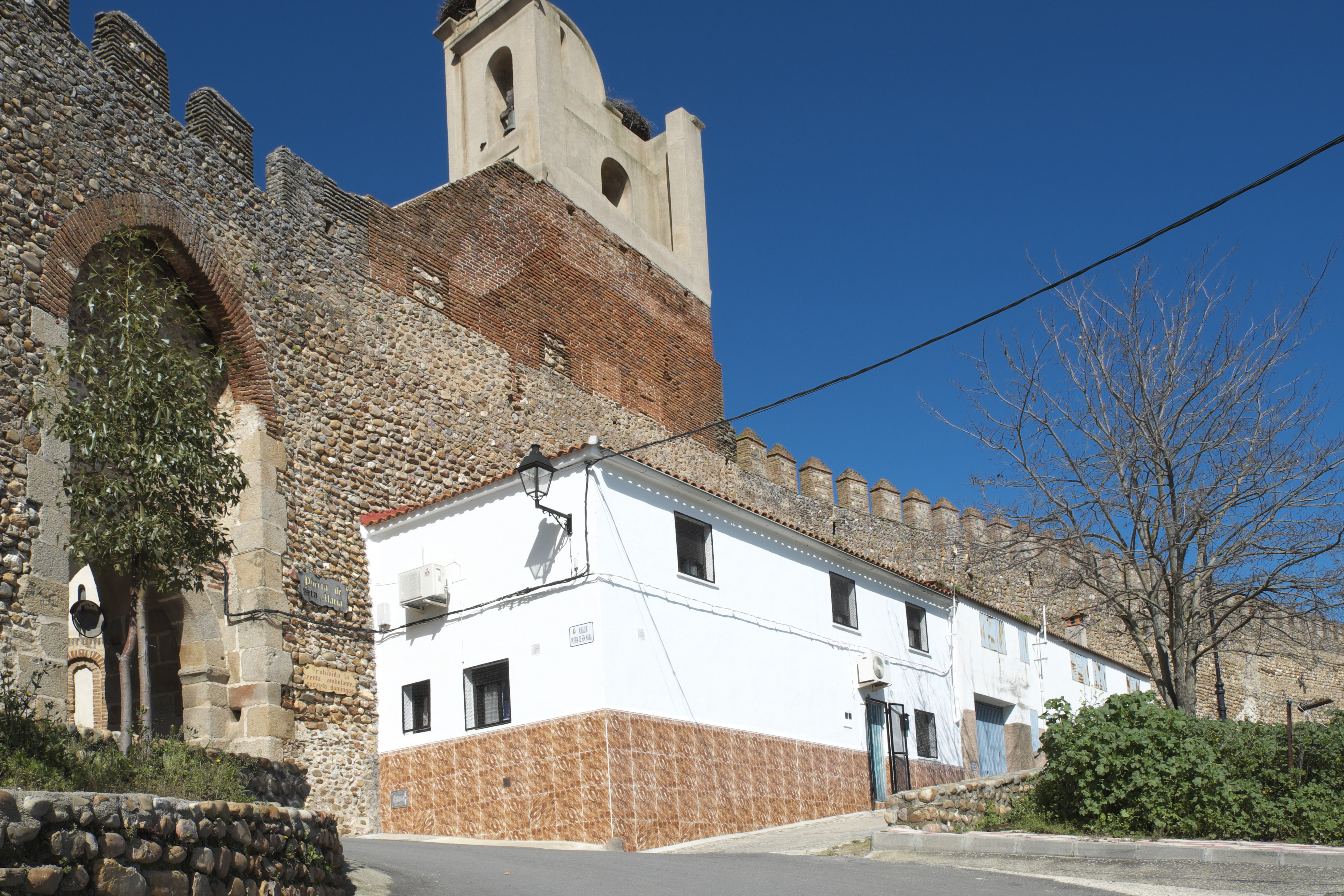 Stadtmauer und Tor Puerta de Santa María in Galisteo in der Provinz Cáceres (Extremadura/Spanien)